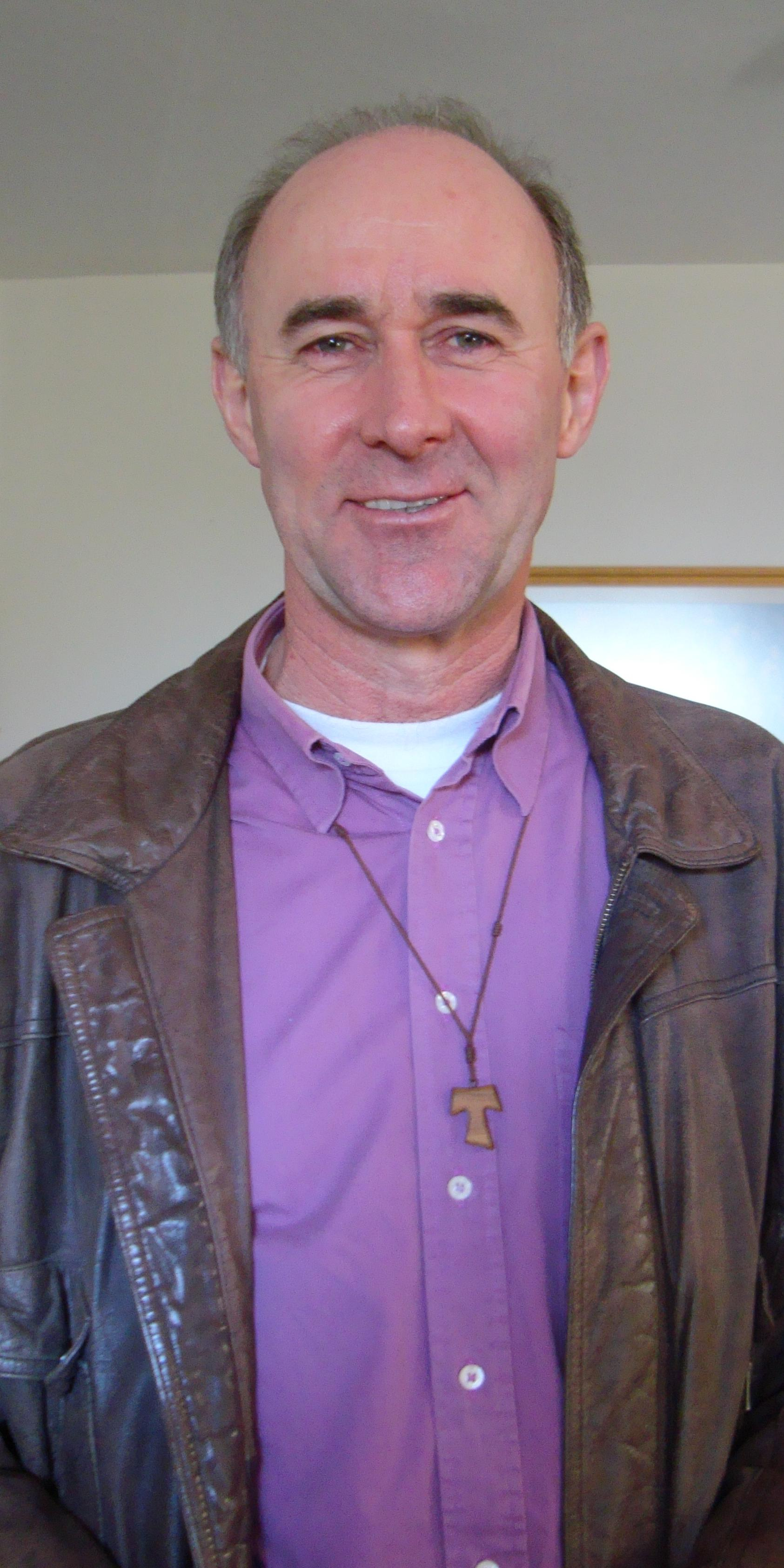 João Inácio Müller, OFM, ministro da Província São Francisco de Assis, Rio Grande do Sul, Brasil